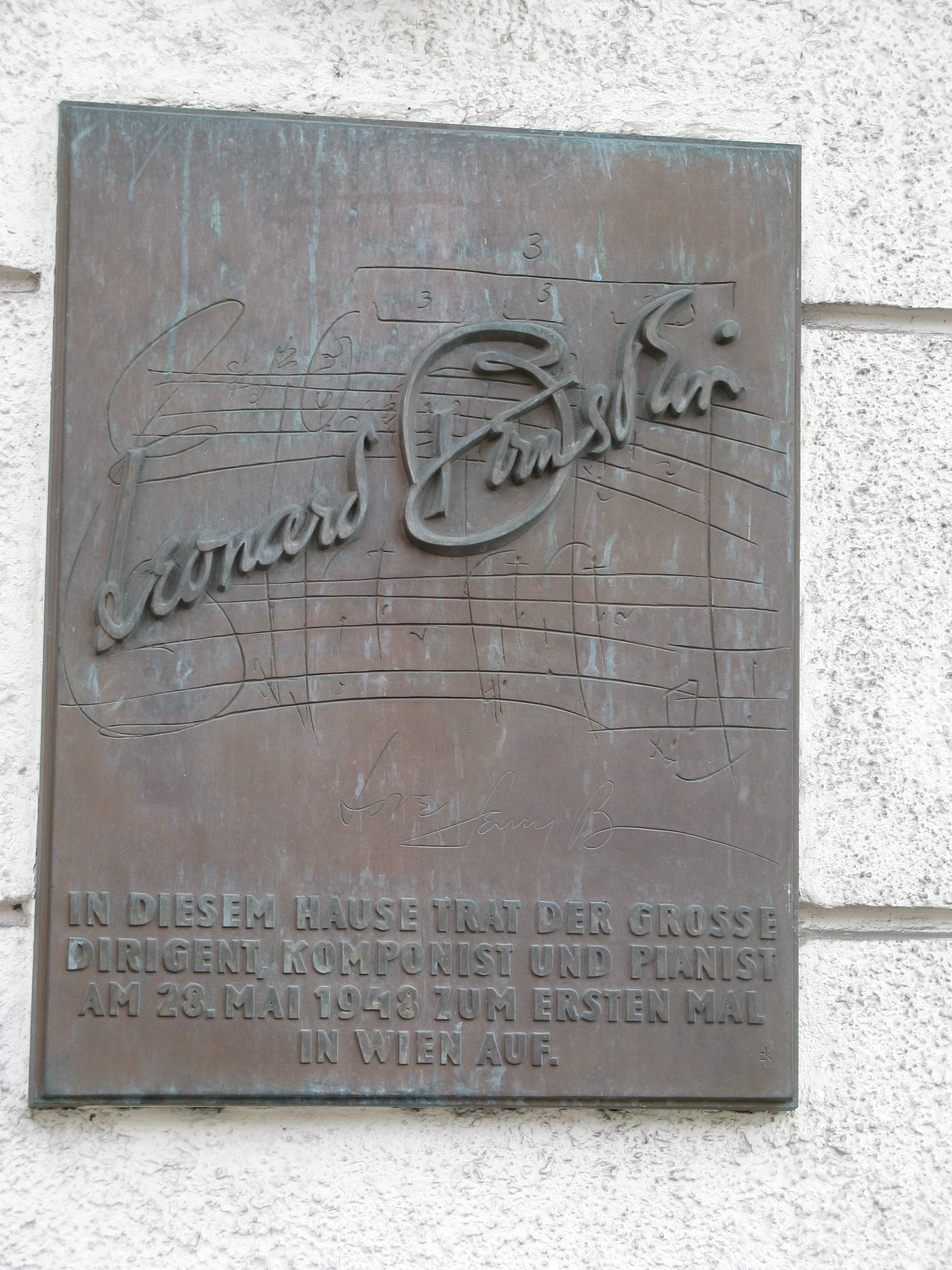 Konzerthaus, Vienna.